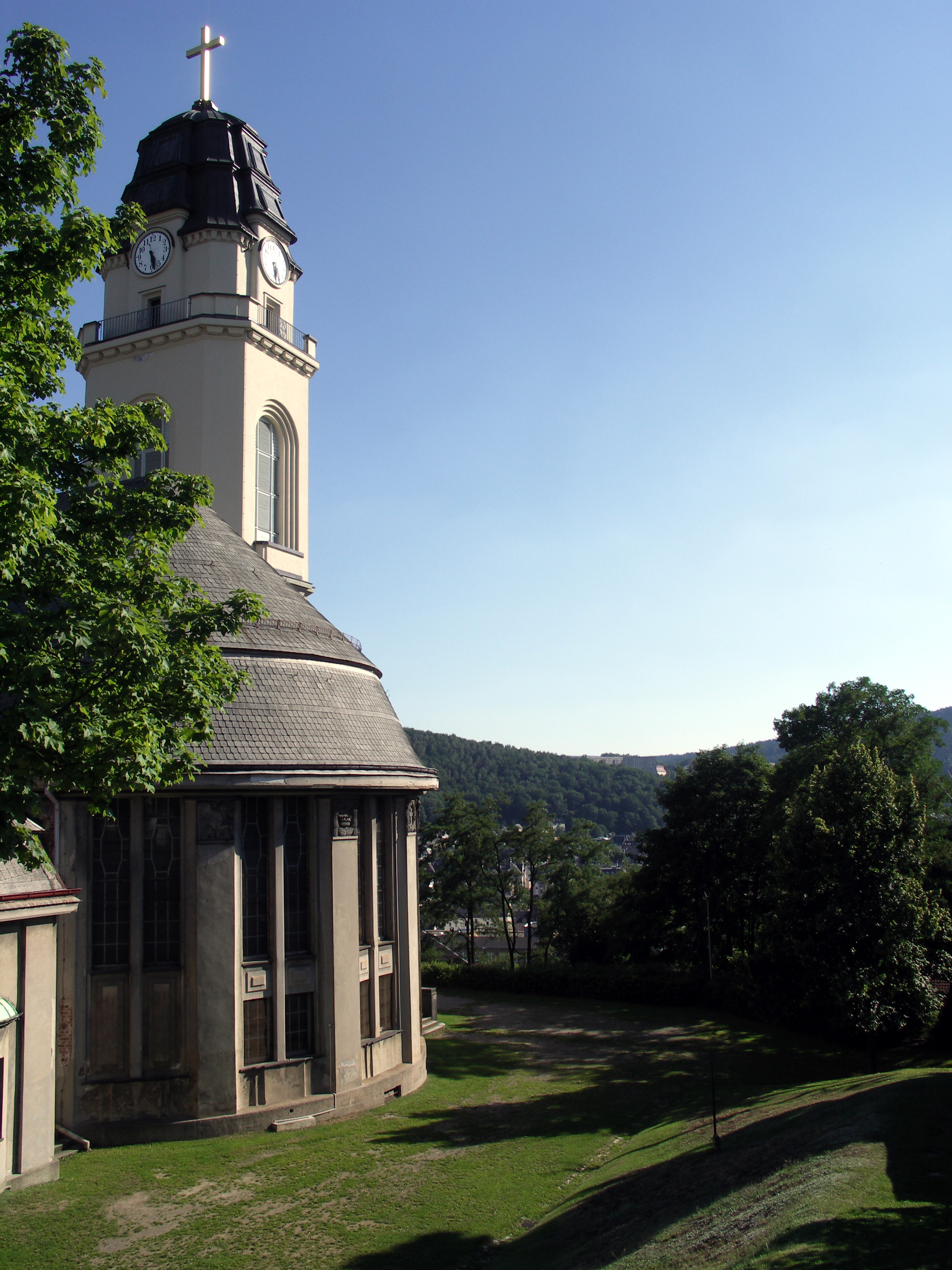 Aue, Friedenskirche